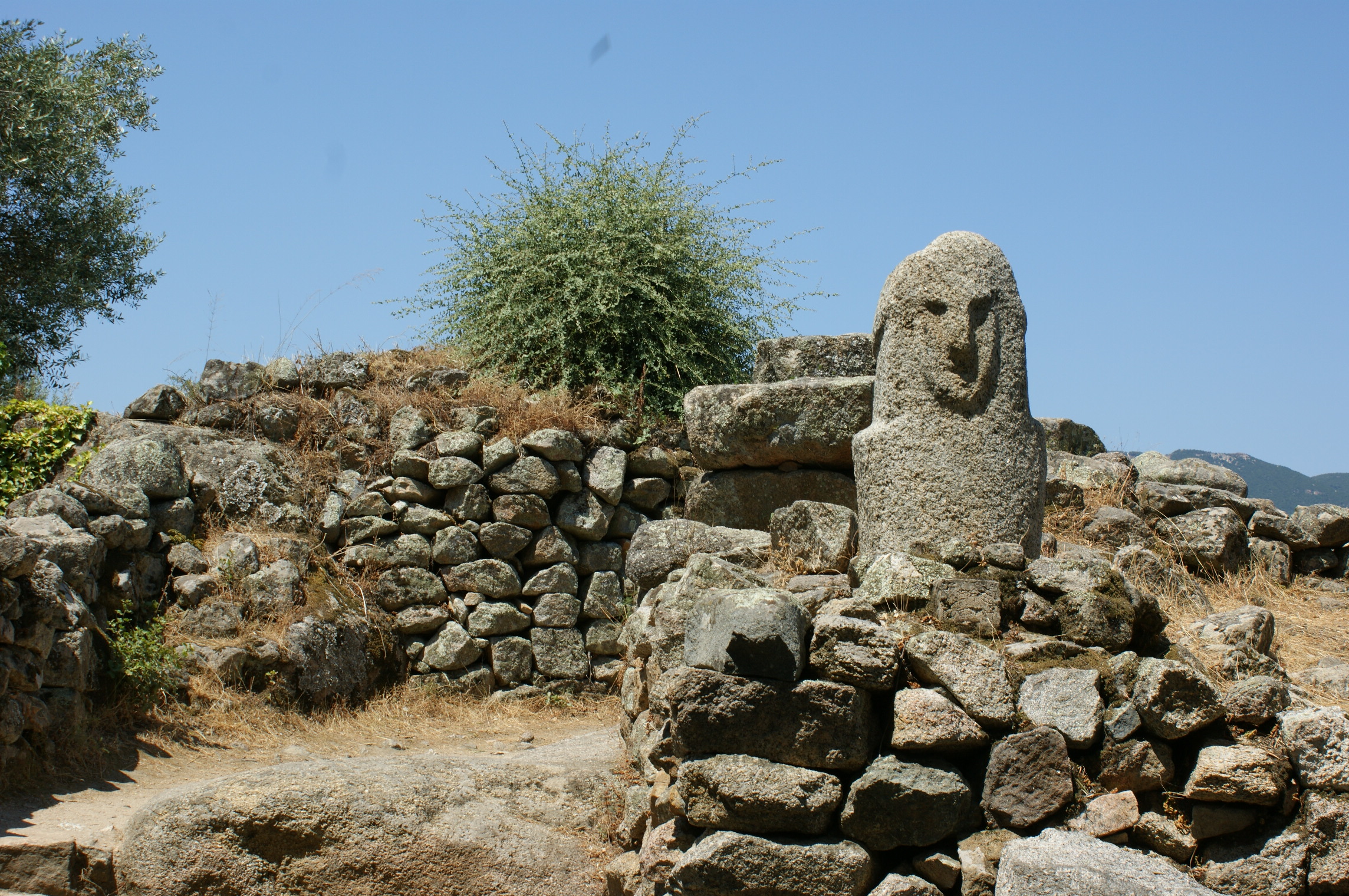 Istoricii speculează că statuile de pe fortificații au avut rolul de a crea potențialilor invadatori impresia că apărătorii erau mai numeroși.